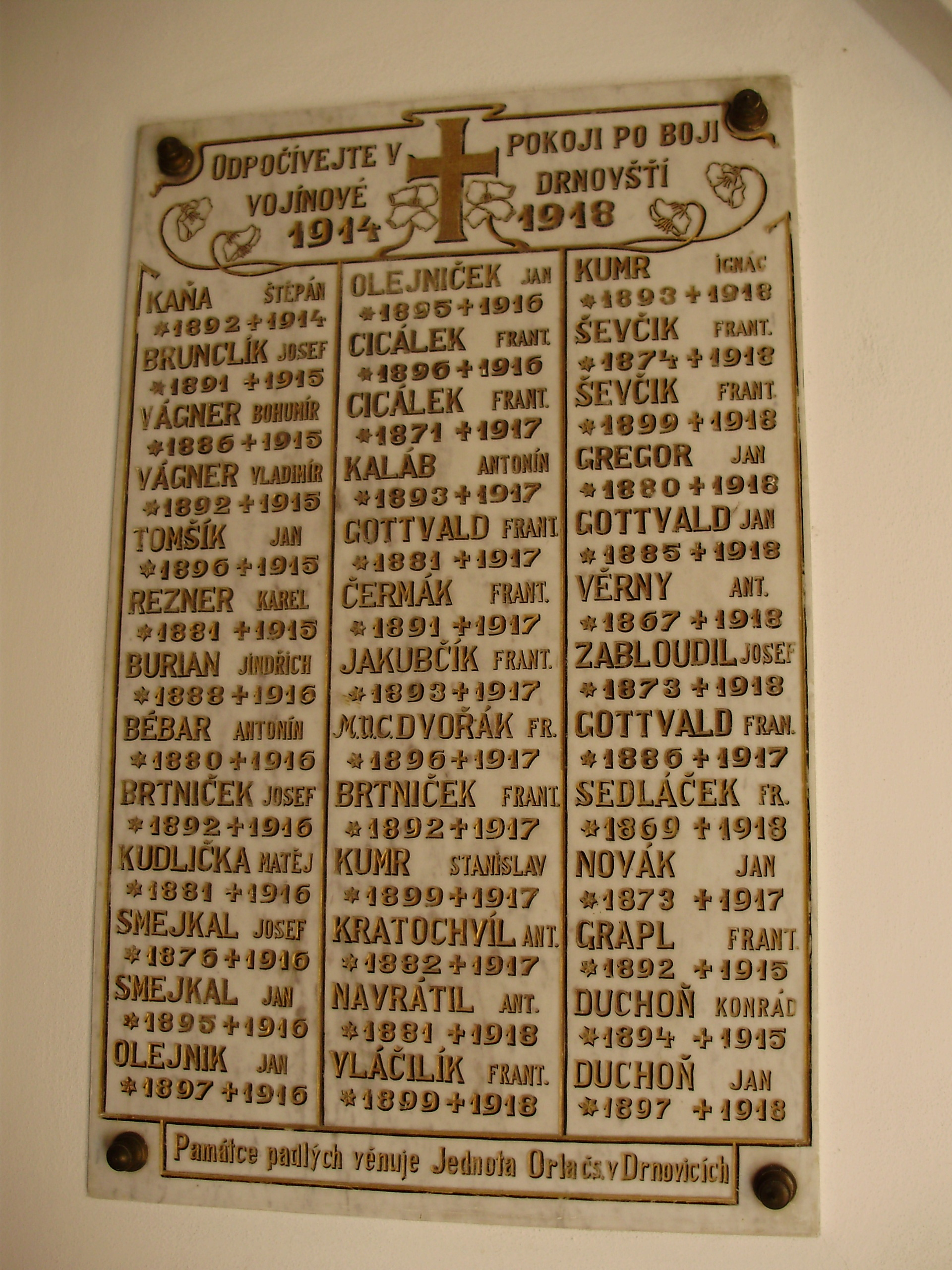 Památce padlých v interiéru kostela v Drnovicích (Vyškov District, Czech Republic)